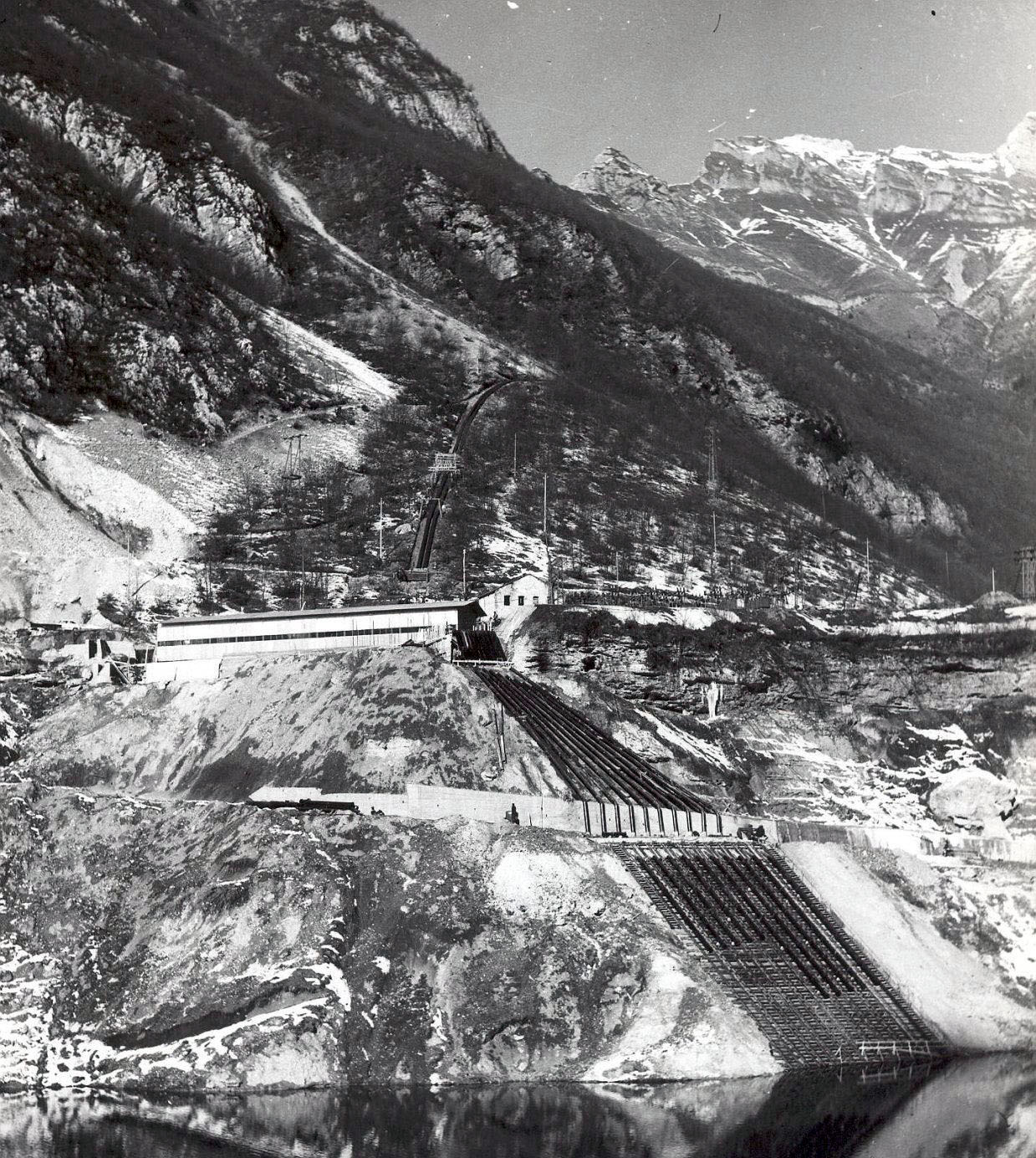 L'impianto di pompaggio provvisorio in riva al lago del Vajont, usato nel 1964.